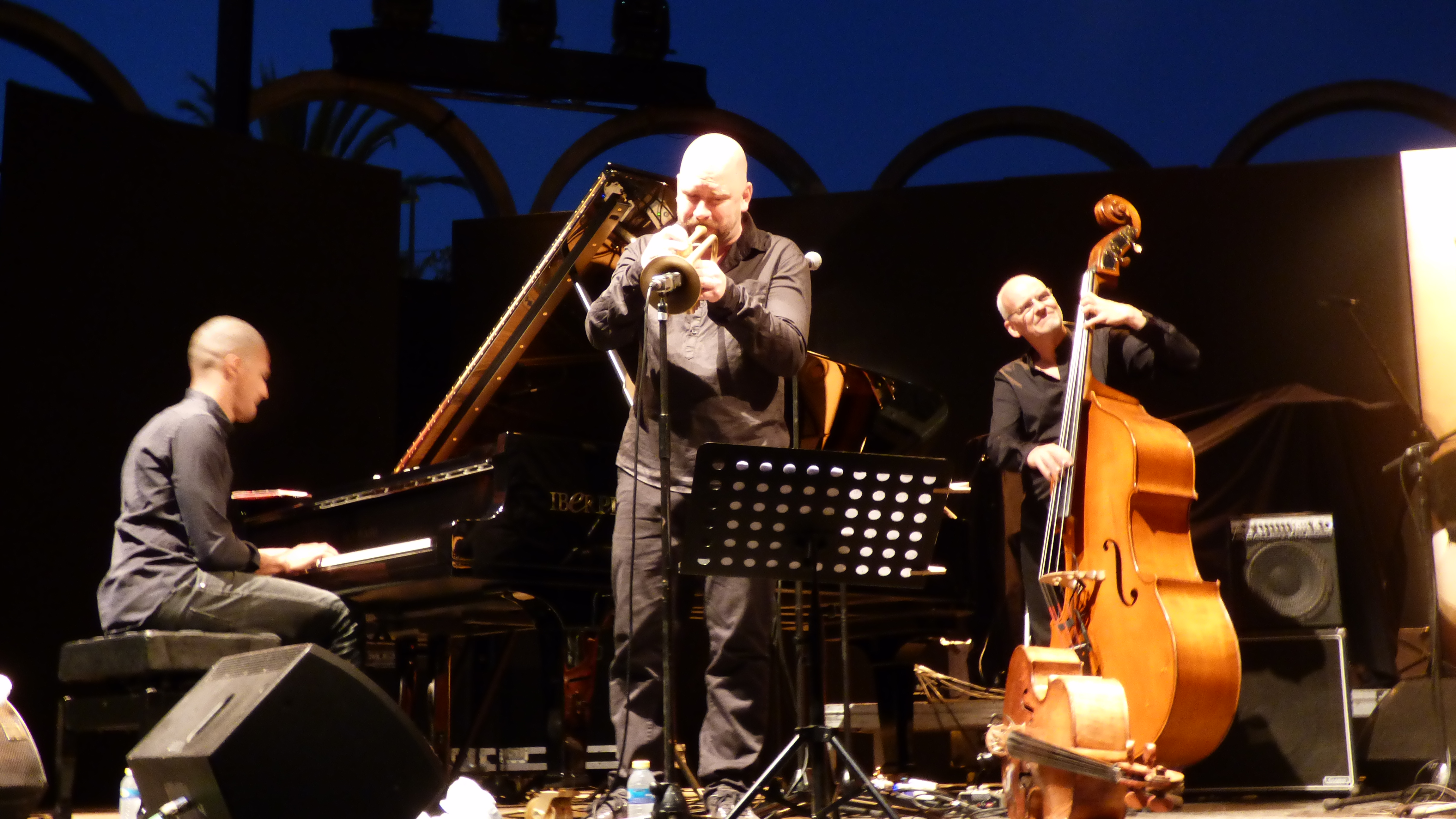 Lars Danielsson New Quintent, plano general (piano tompreta y bajo) de la actuación en la XIX edición del Festival Internacional de Jazz de San Javier, 1 de julio de 2016